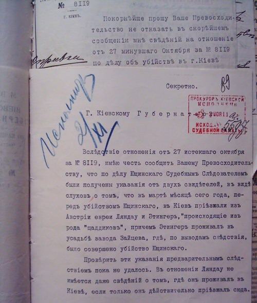 Дело об убийстве Ющинского. Письмо Прокурора Киевской Судебной Палаты Г.Г.Чаплинского Киевскому Губернатору А.Гирсу от 2.11.1911 о "цадиках" Ландау и Этингере. File about murder of Jushchinsky. The letter of the Public prosecutor of the Kiev Court Chamber G.G.Chaplinsky to the Kiev Governor A.Girs from 2.11.1911 about "tsadiks" Landau and Etinger.